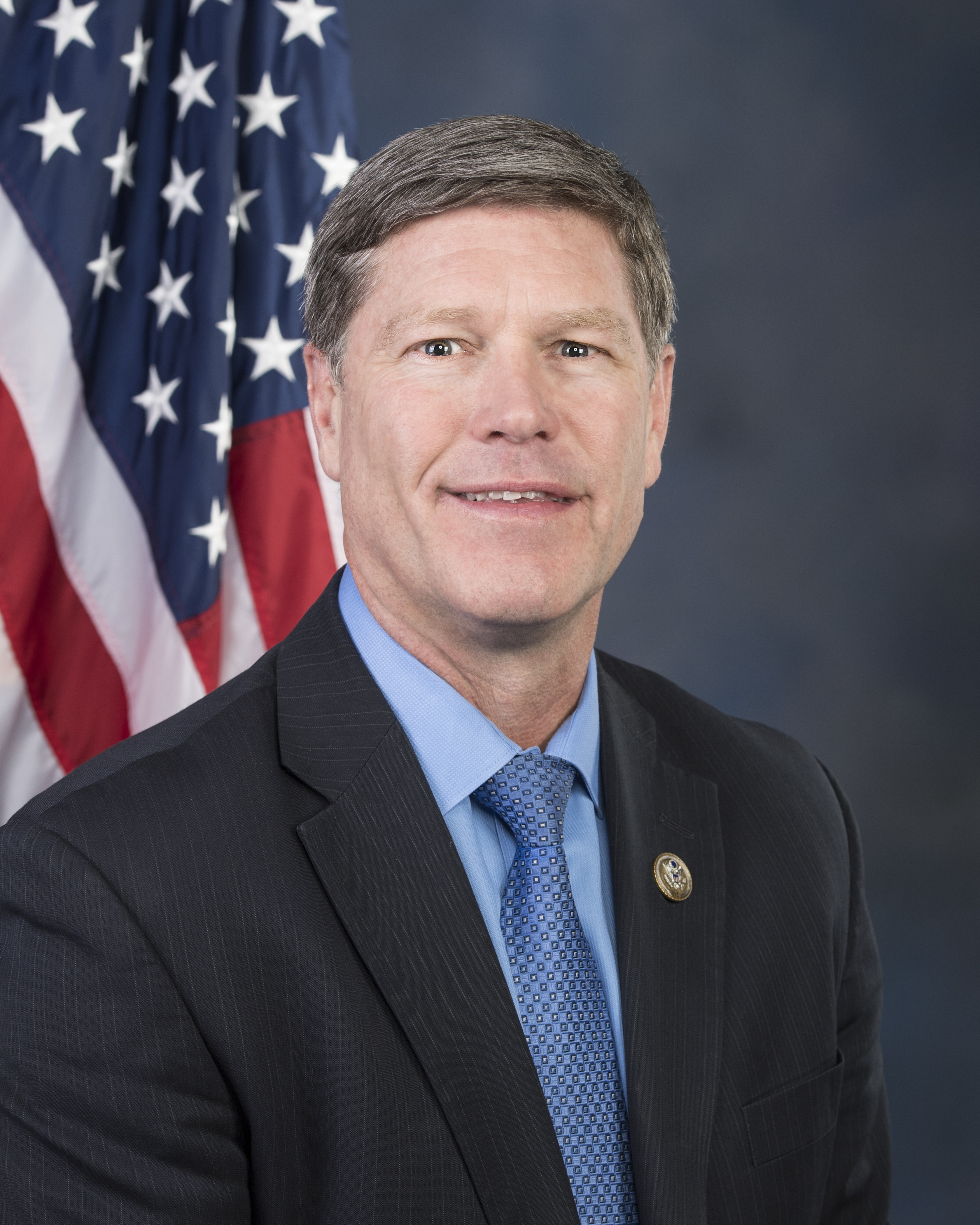 US Rep. Ron Kind (D-WI)